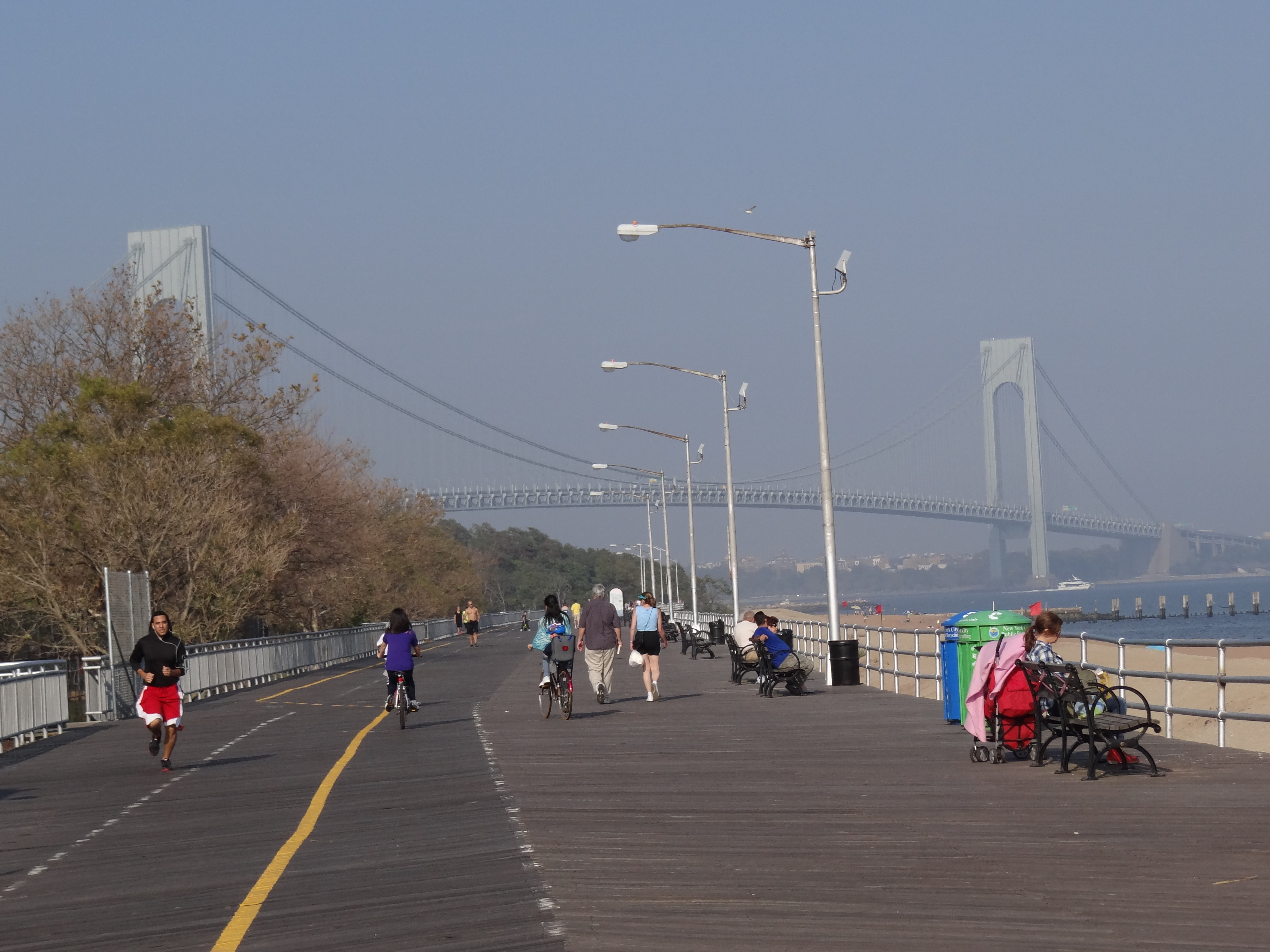 FDR Boarwalk & Beach